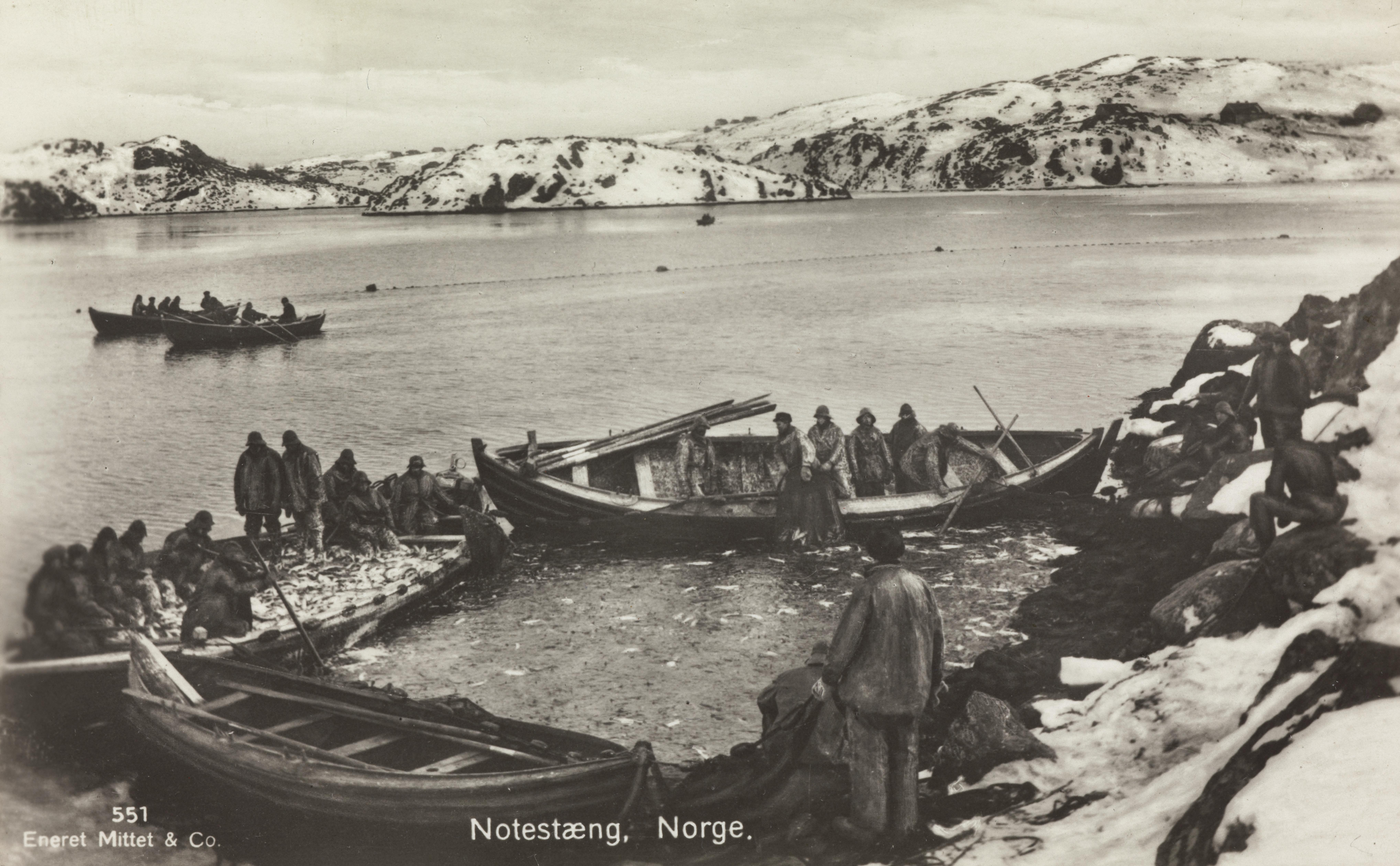 Bildet er hentet fra Nasjonalbibliotekets bildesamling